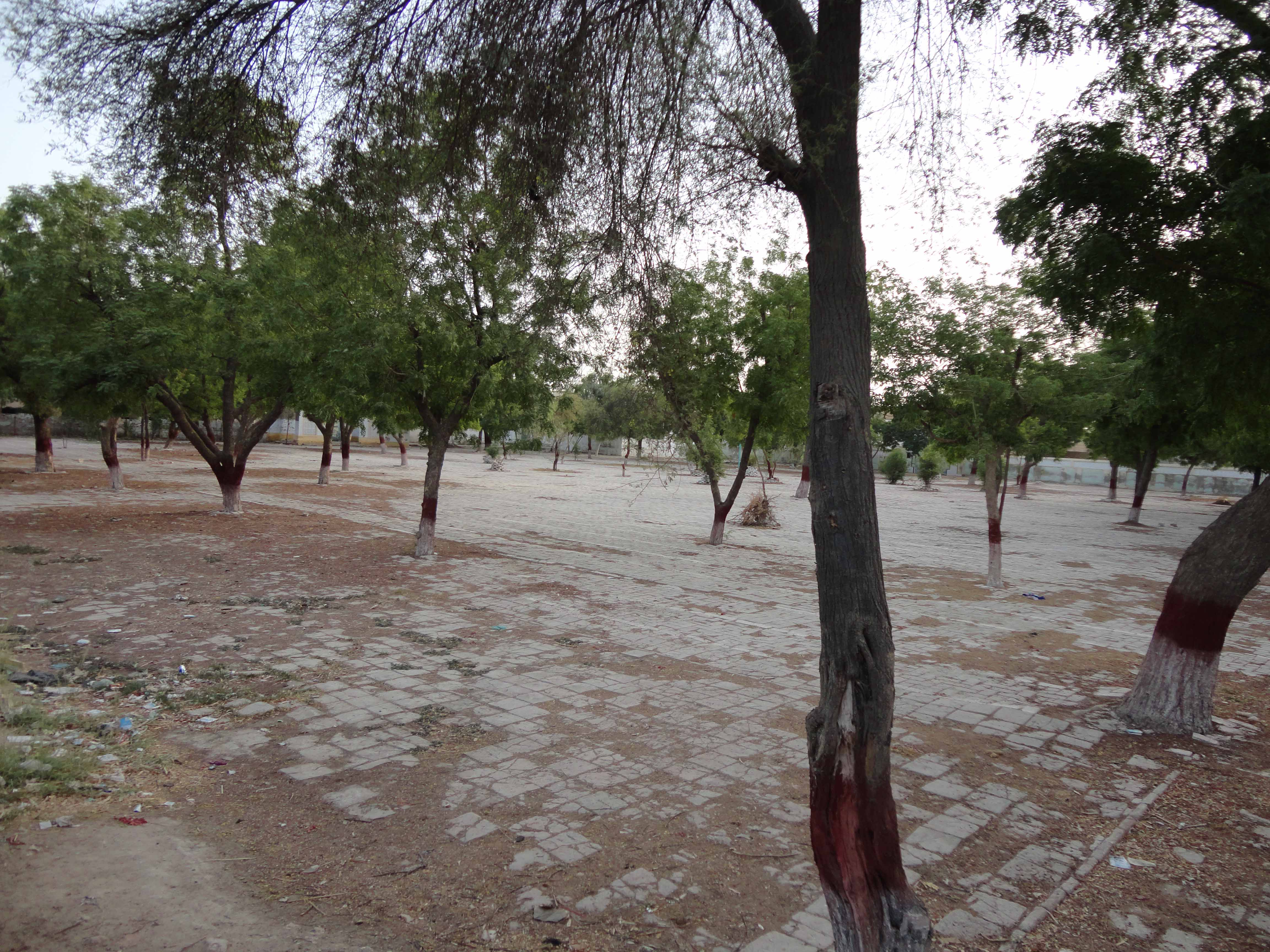 eid gaah shahdadpur